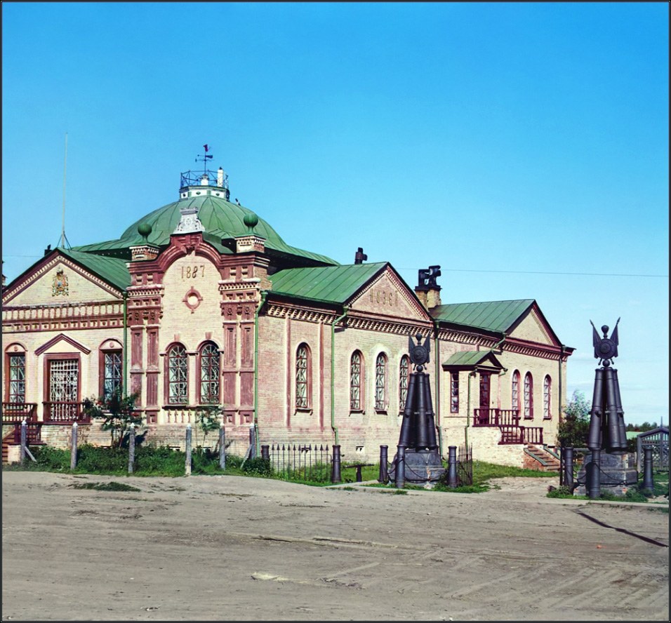 Краеведческий музей в Тобольске (нач. XX века)